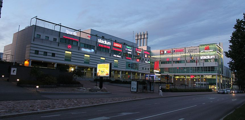 Myyrmannin ostoskeskus elokuisena iltana 2013. Huom: Muista säilyttää viittaus kuvaajaan, mikäli käytät kuvaa.